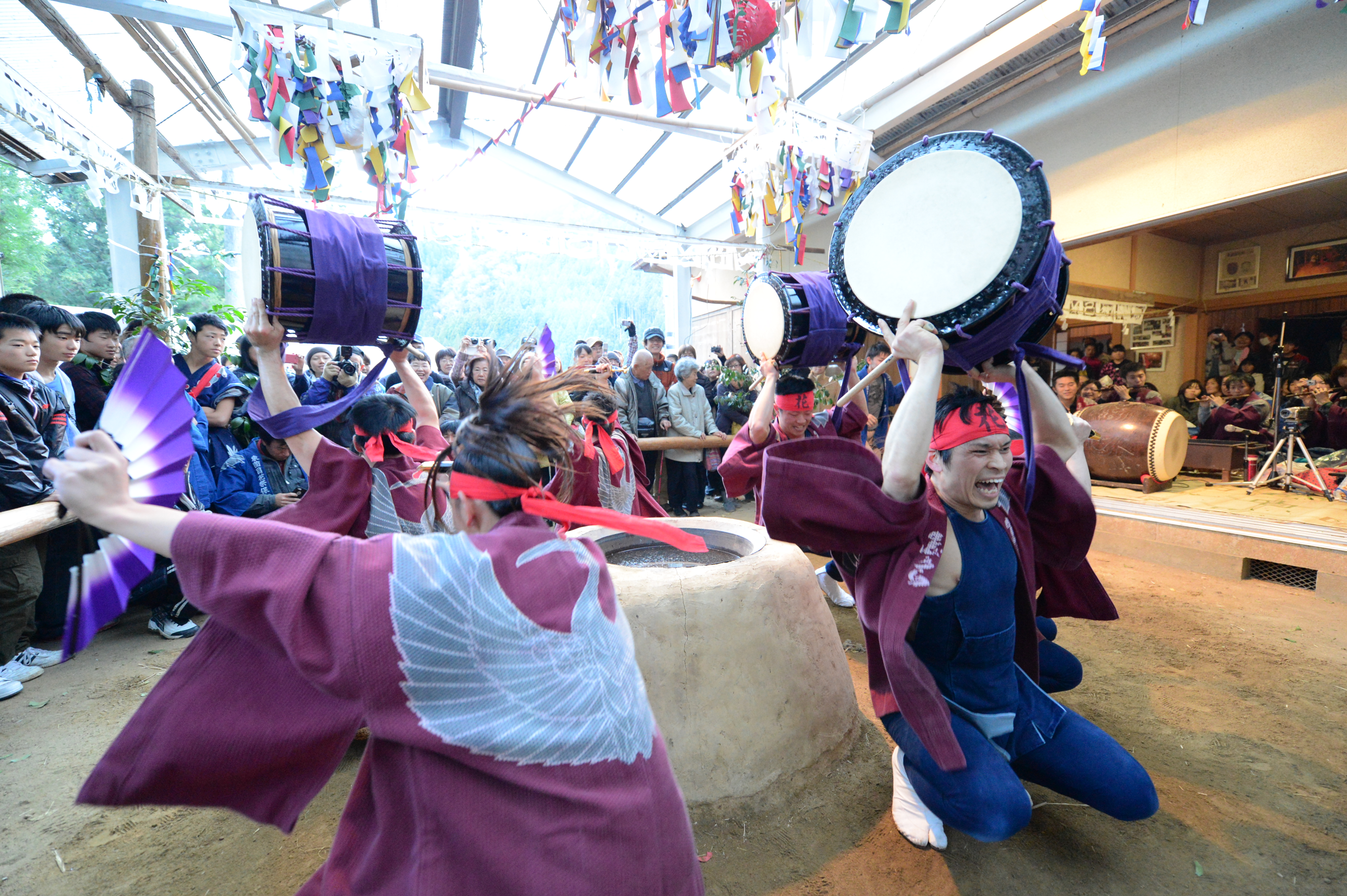 愛知県北設楽郡東栄町を拠点とする創作和太鼓集団「志多ら」。東薗目花祭における舞奉納。